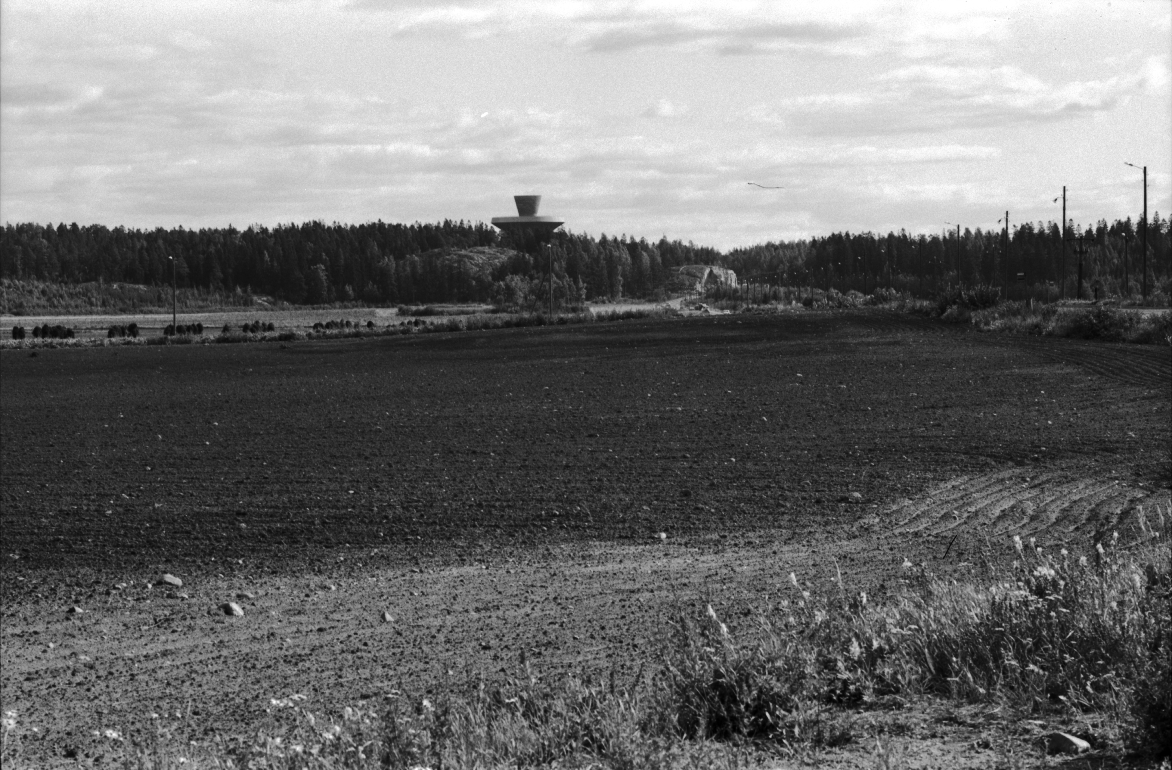 Näkymä Viikin Latokartanon pellolta kaakkoon; Näkymä Viikin Latokartanon pellolta kaakkoon. Oikealla Viikintie ja Herttonemen satamarata. Taustalla Myllypuron vesitorni. -- negatiivi, filmi, mv